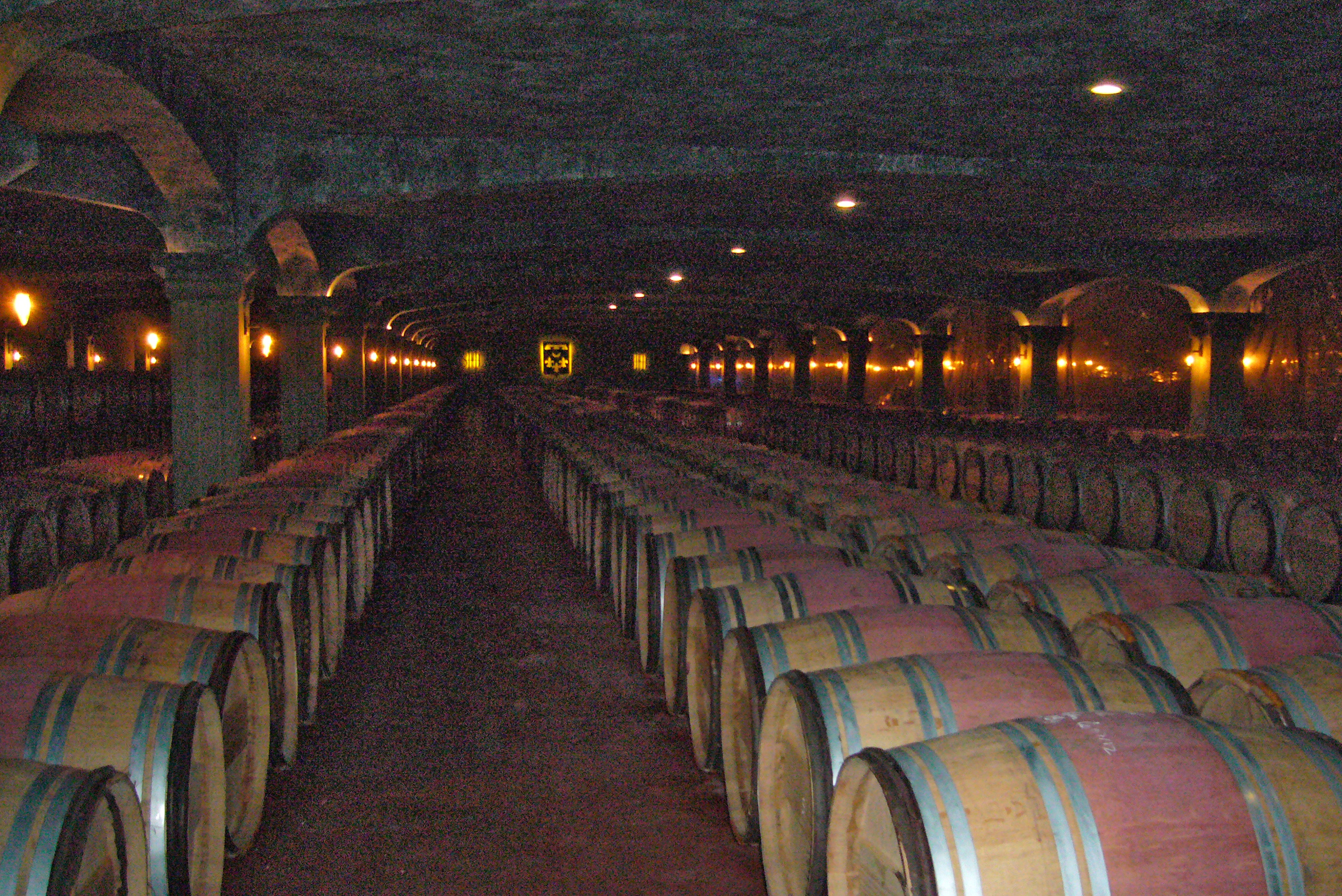 Caves de vin rouge Smith Haut Lafitte